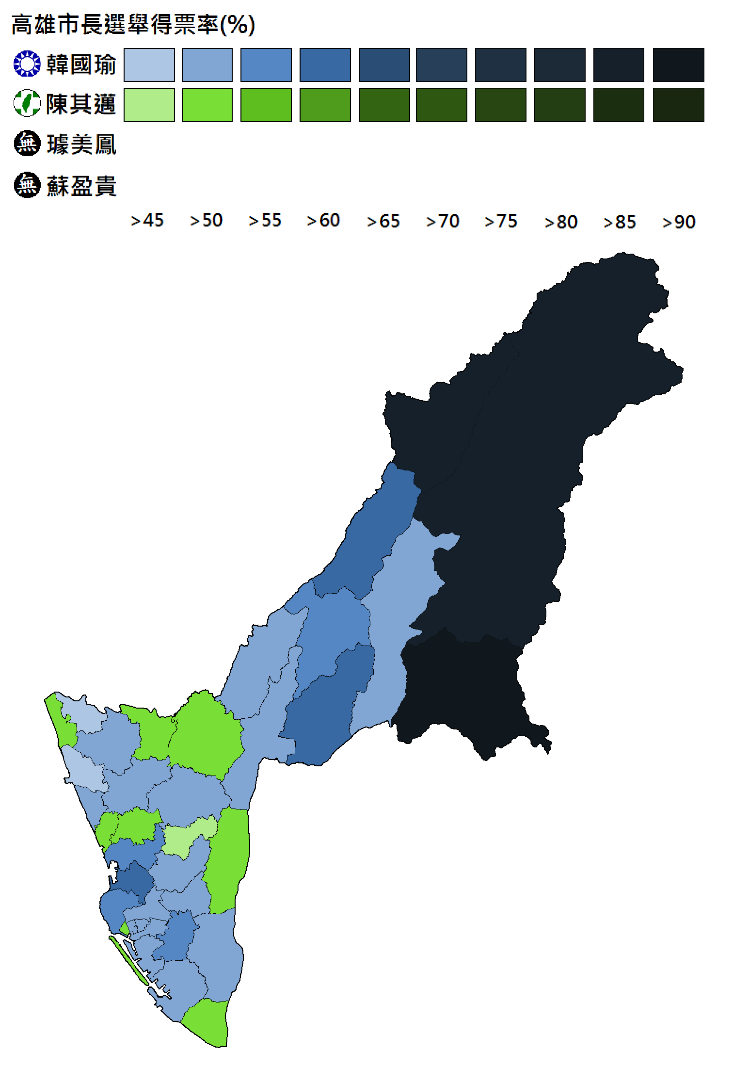 高雄市長選舉得票分布。